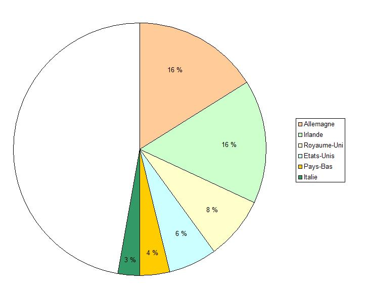 Origine de la population de Hartford (Michigan, Etats-Unis).